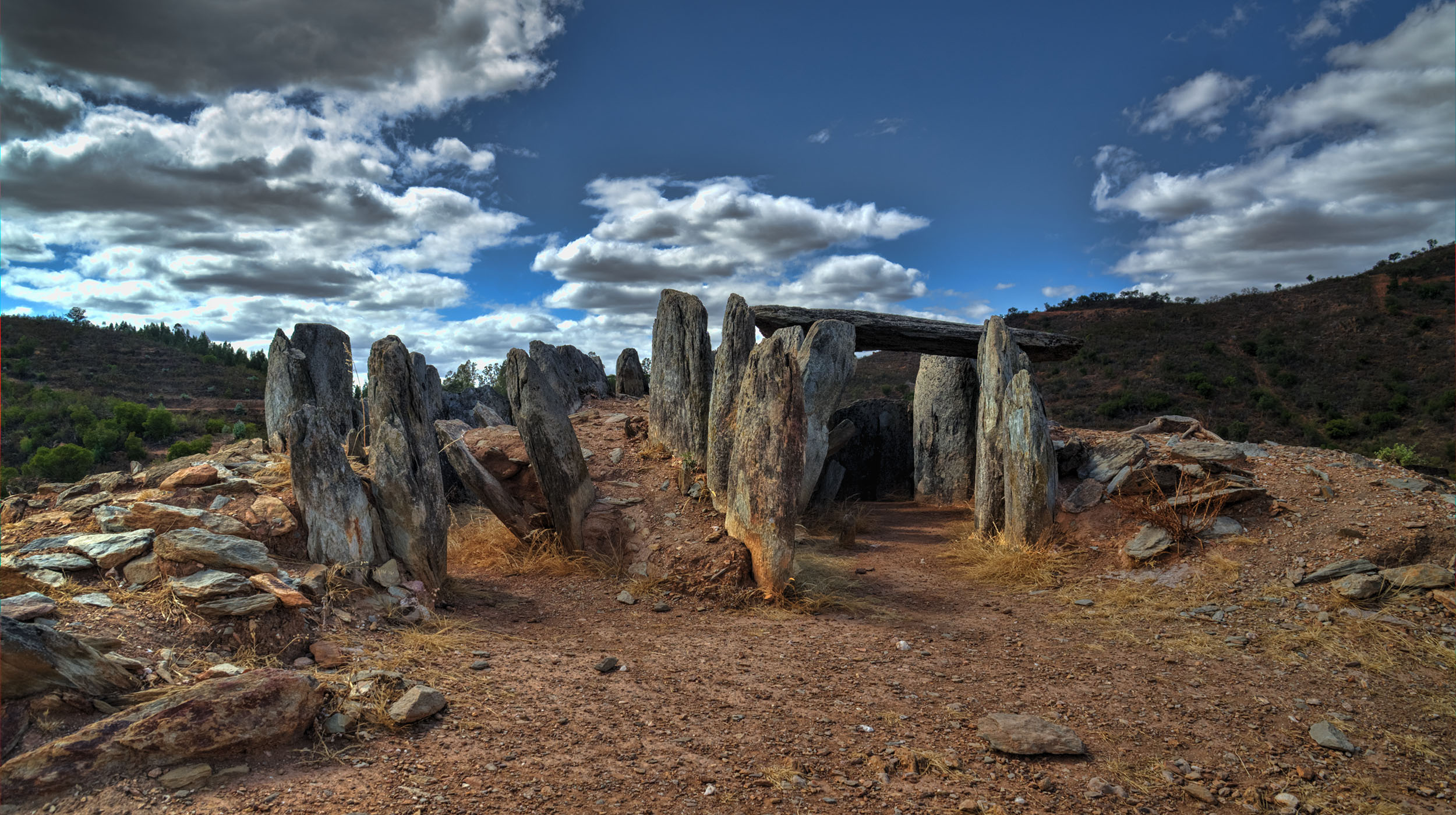 El conjunto dolménico El Pozuelo está en el municipio de Zalamea la Real, provincia de Huelva.